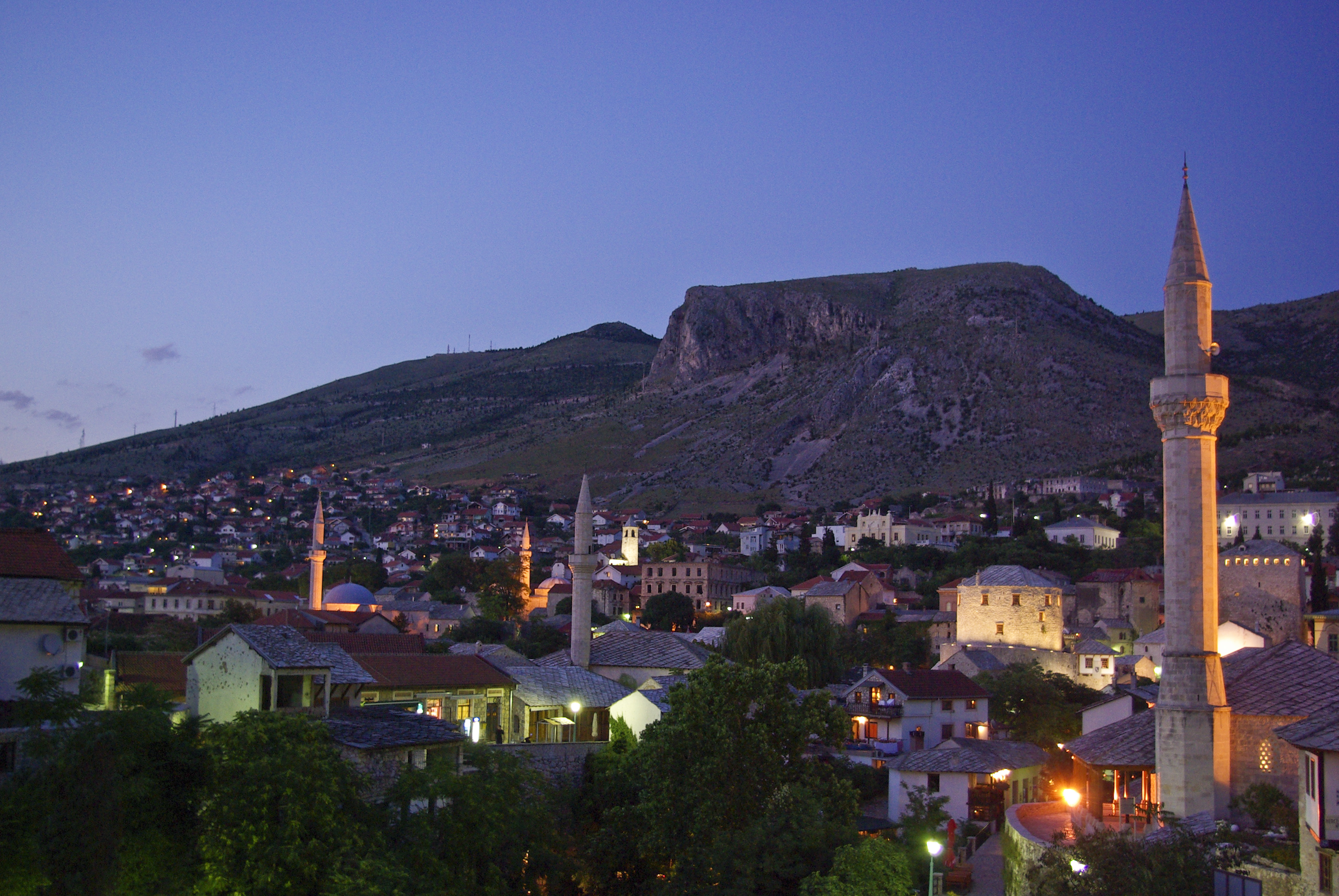 Mostar at dusk